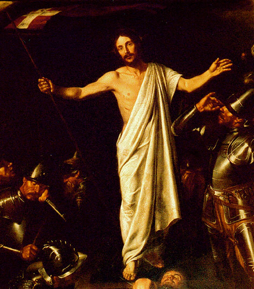 la résurection du Christtitle QS:P1476,fr:"la résurection du Christ" label QS:Lfr,"la résurection du Christ"